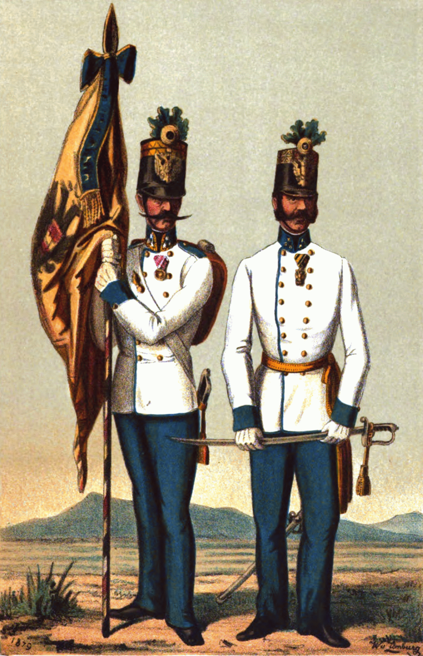 Hauptmann und Fahnenträger des „Niederösterreichischen Infanterie-Regiments Hoch- und Deutschmeister Nr. 4“ 1850-1860. Hauptmann und Fahnenträger von Hoch- und Deutschmeister 1850–1860